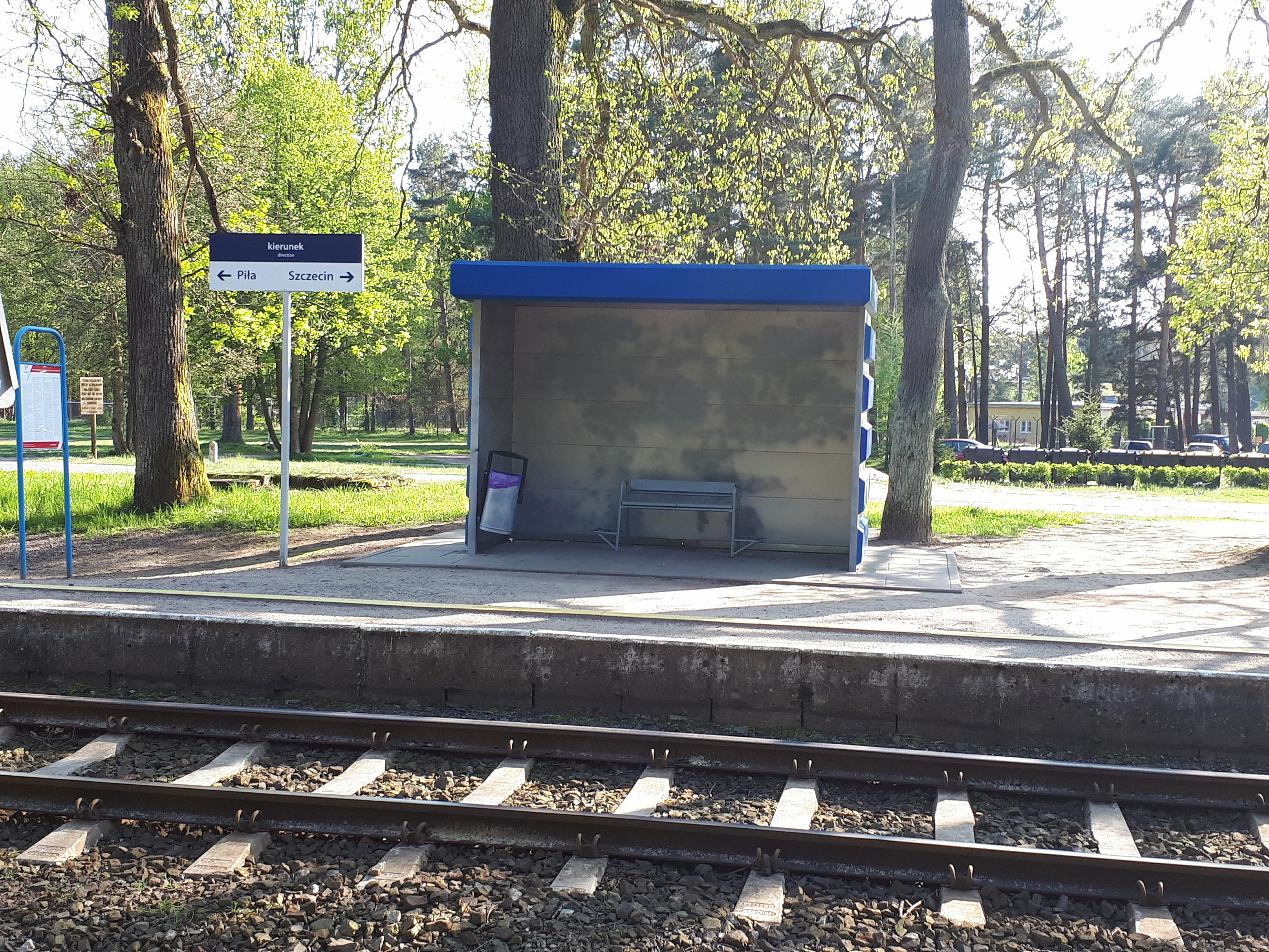 Wiata i tabliczka kierunkowa